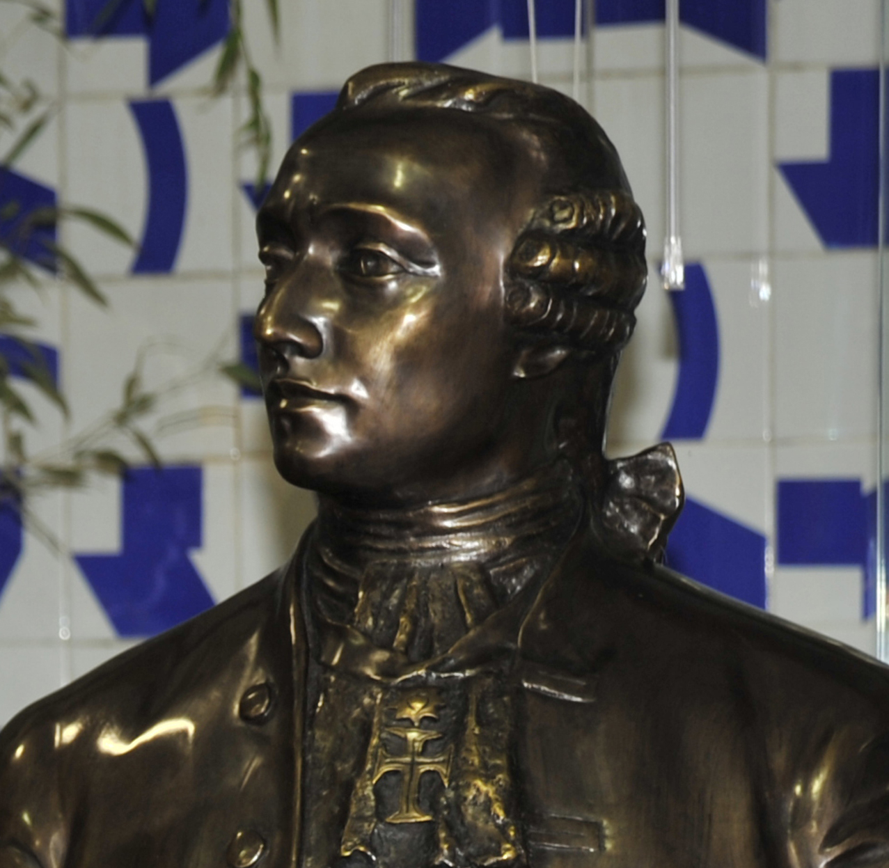 Busto do diplomata luso-brasileiro Alexandre de Gusmão no Senado Federal do Brasil